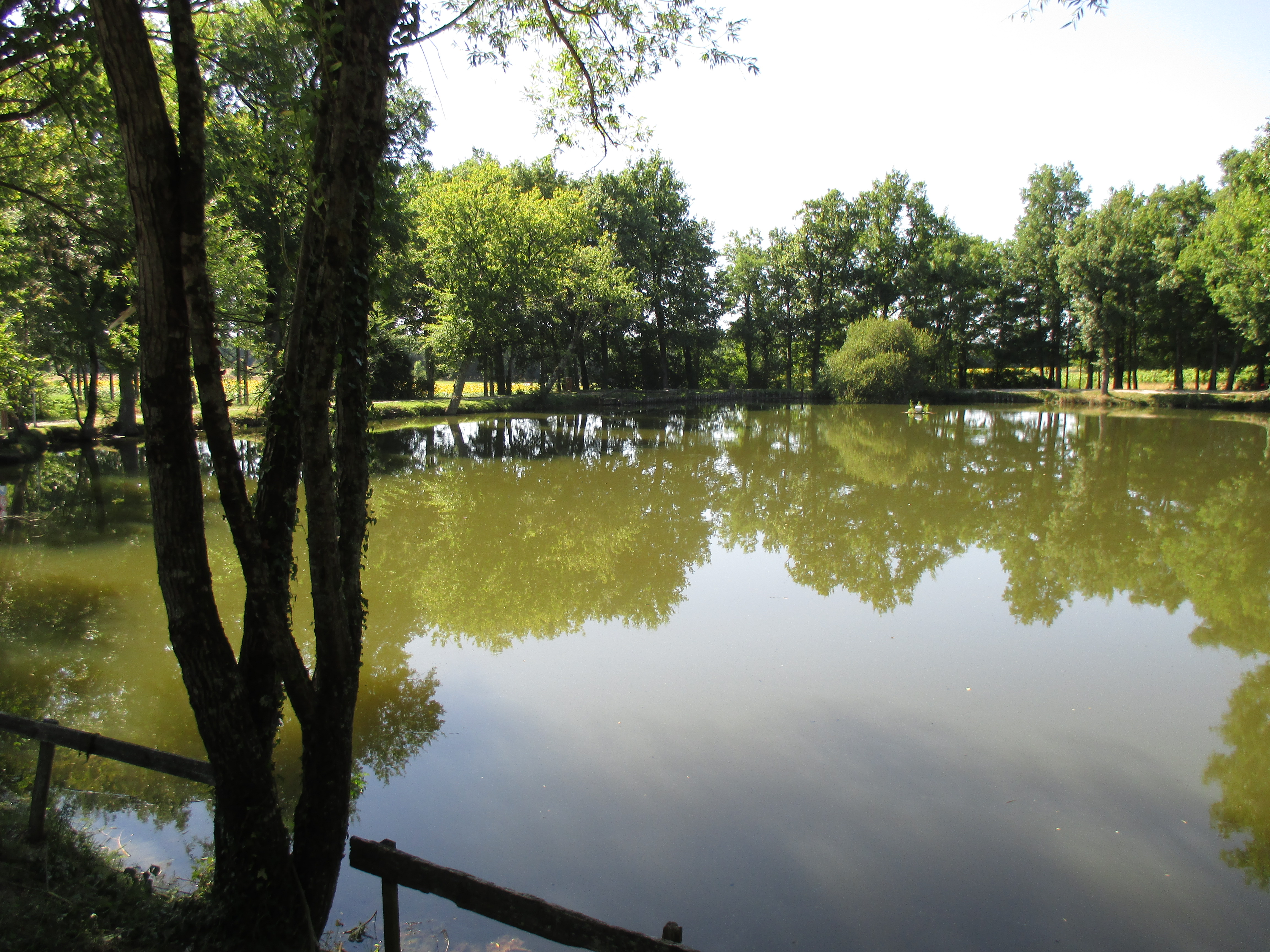 Vue du Clône Flanquet, à Préguillac (17)